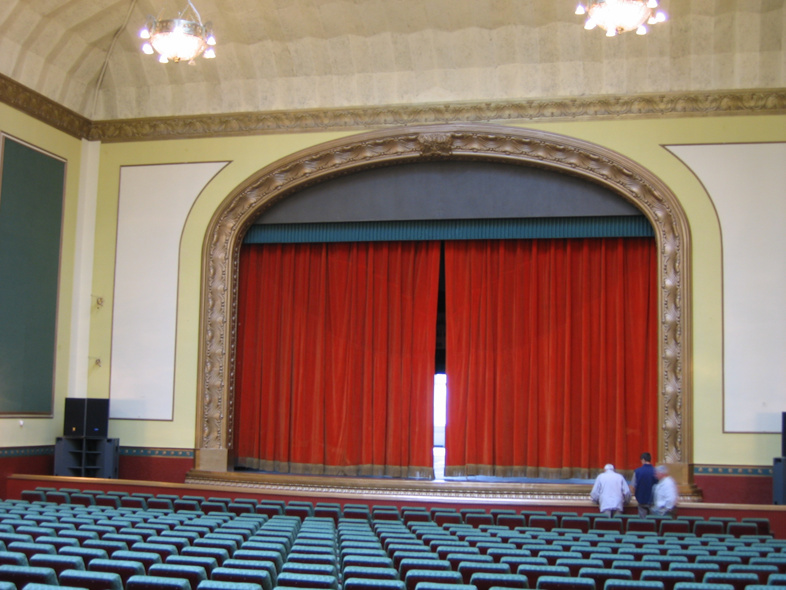 Az Olvasó előadóterme a nézőtérről. Sokszor otthonául szolgál a Dumaszínház előadásainak.